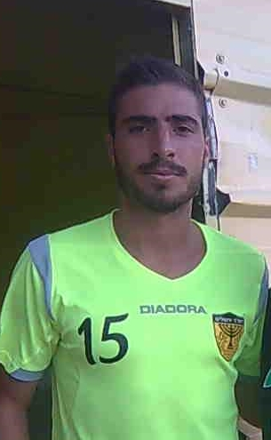 שי חדד במדי בית"ר ירושלים 2012